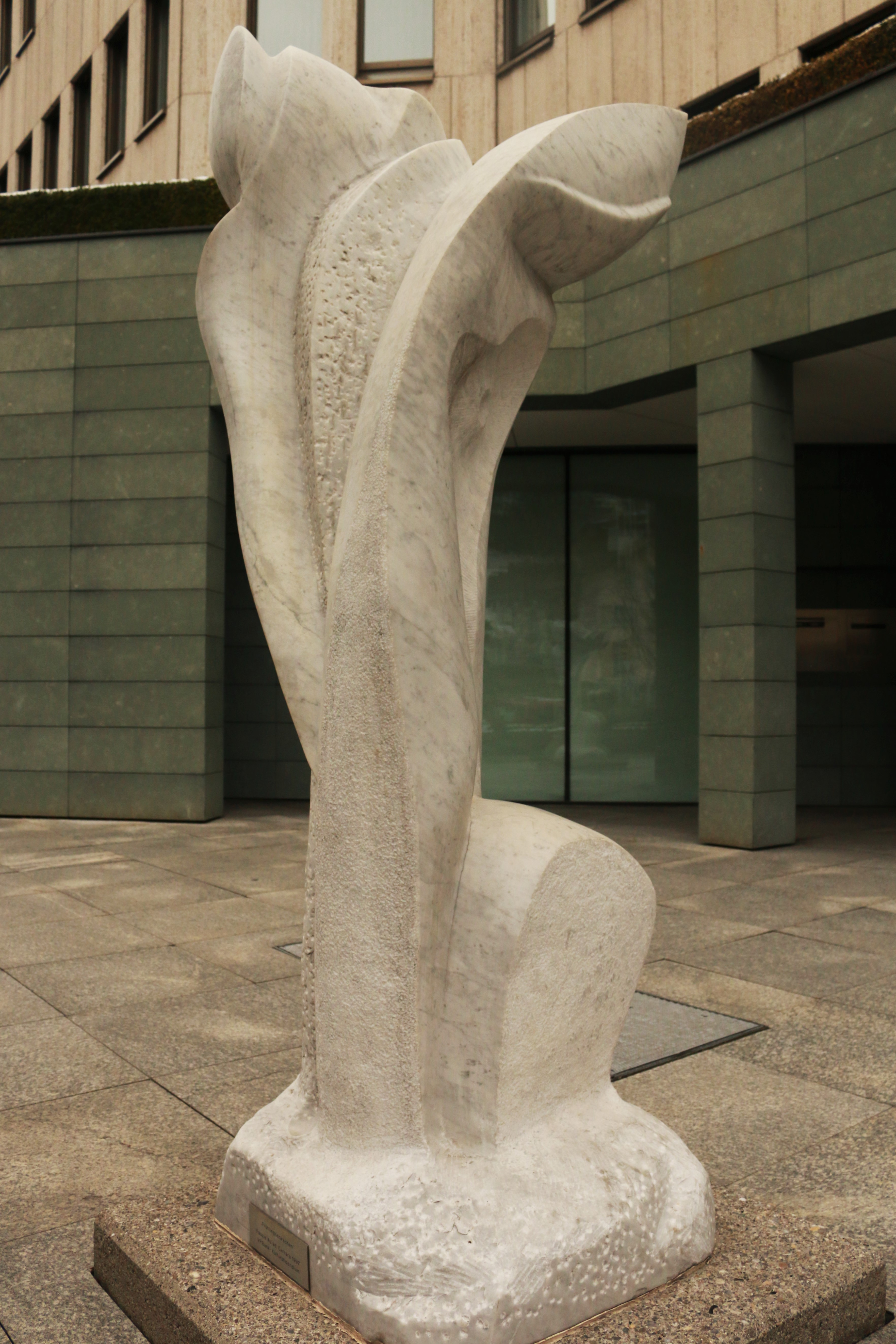 Carrara-Marmor, Höhe 240 cm. Standort: VP Bank AG im Zentrum von Vaduz (Liechtenstein). Werk des indonesischen Bildhauers FauZie As'Ad, das im Rahmen des Kulturstipendiums der VP Bank im Luigi Corsanini Laboratory of Sculpture in Carrara/Italien entstanden ist.